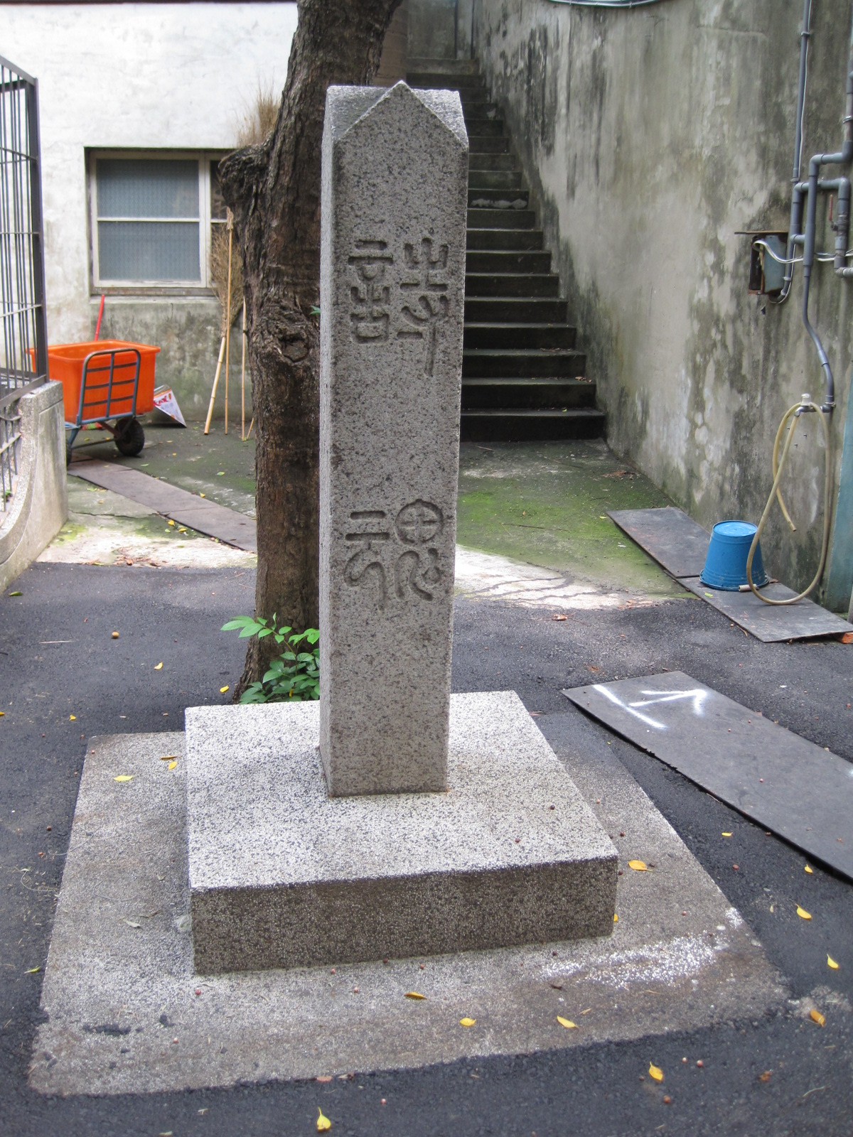 臺南開元寺詩魂碑。